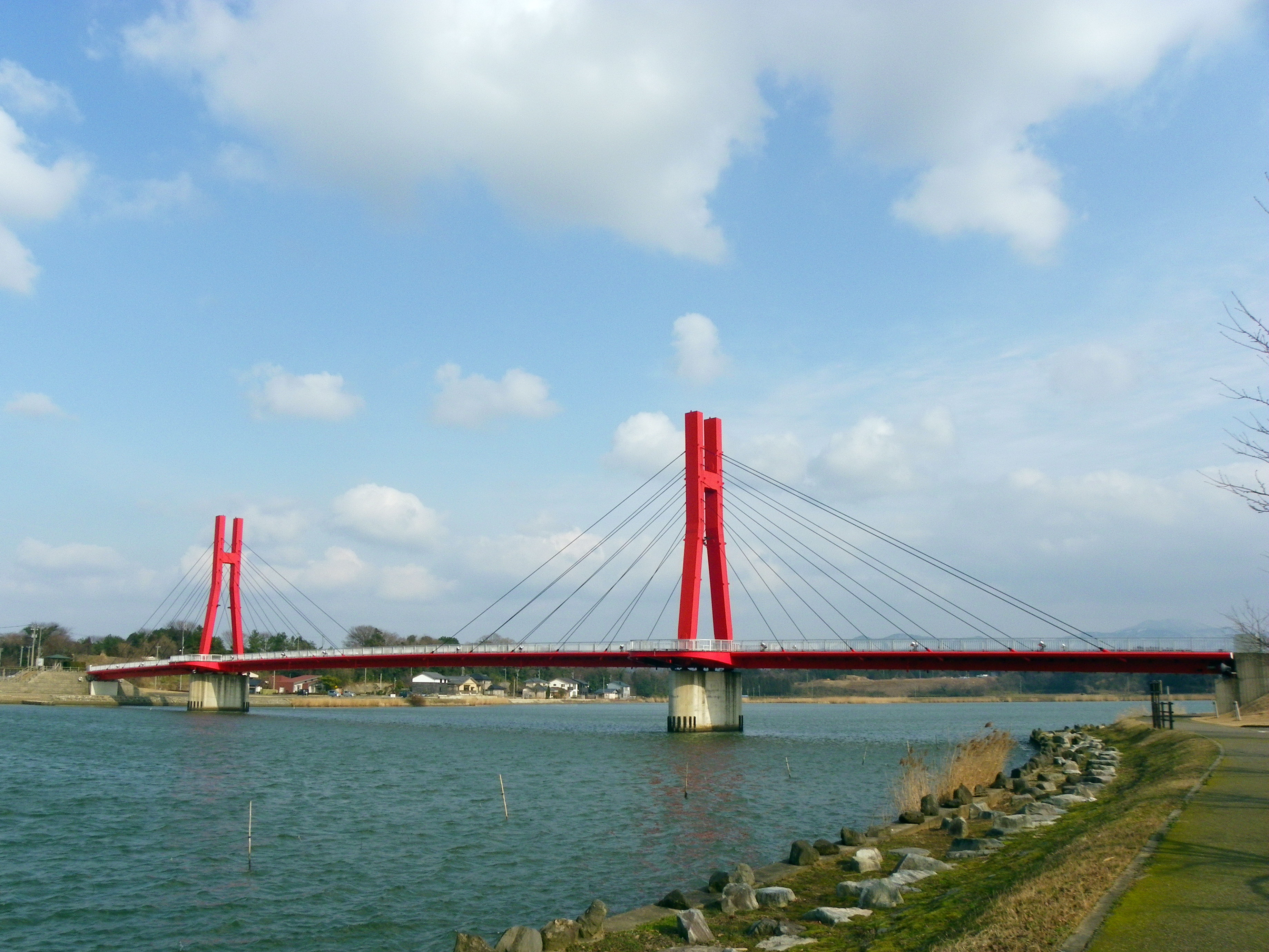 北潟湖のアイリスブリッジ